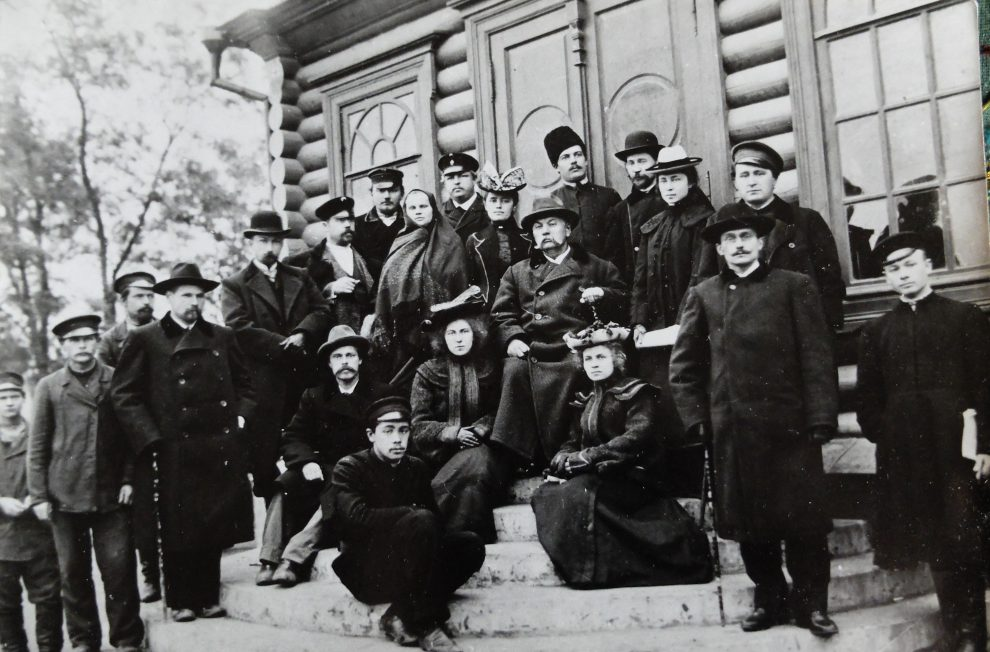 Труппа Кропивницкого 1890-х годов